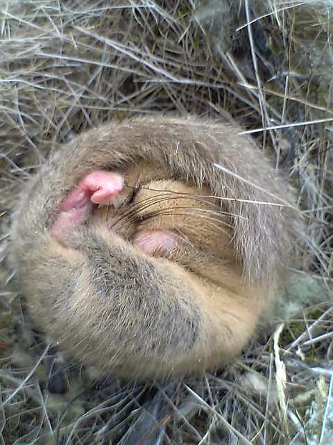 球形になって休眠しているヤマネ